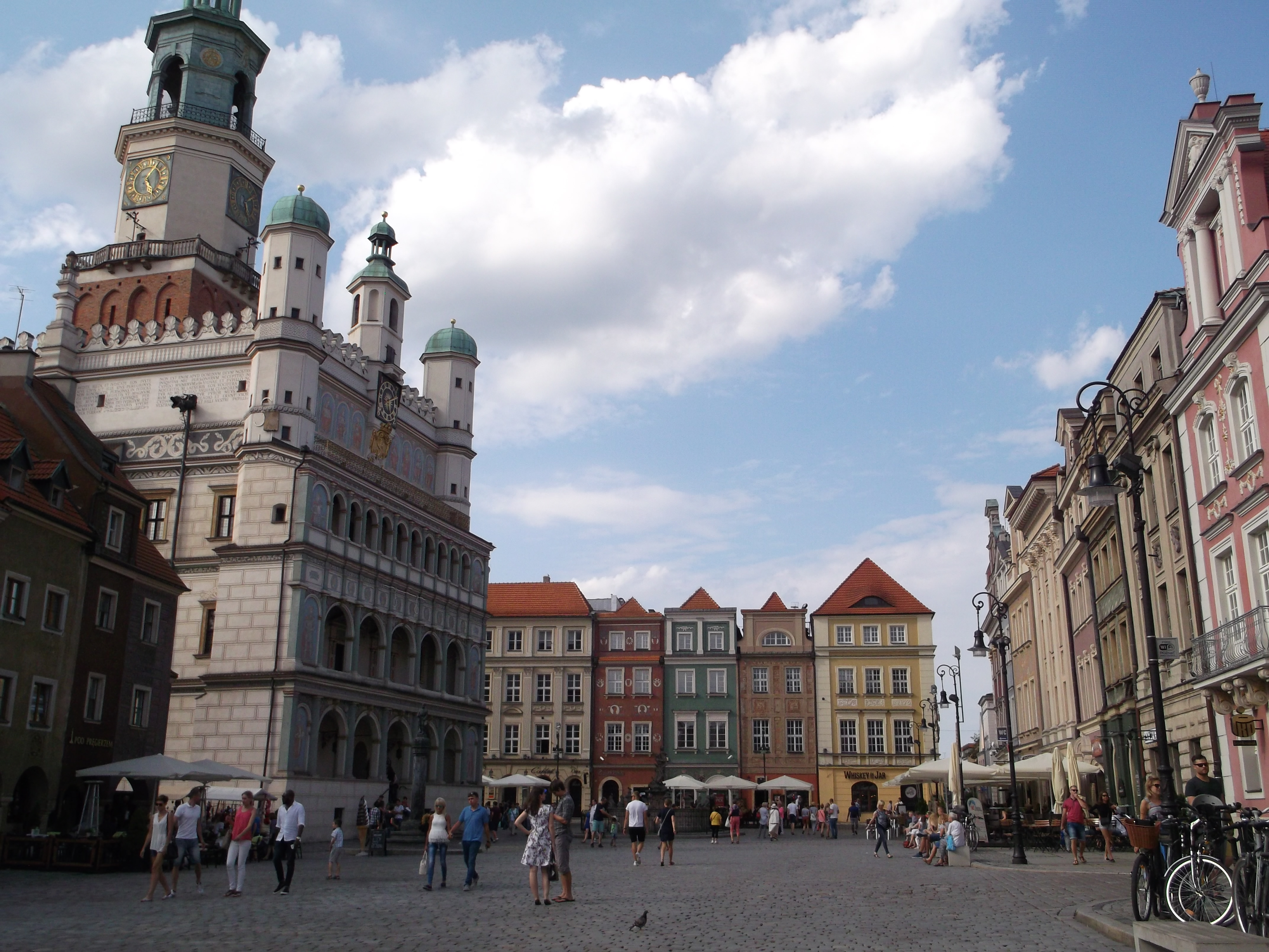 Ratusz i Stary Rynek w Poznaniu.